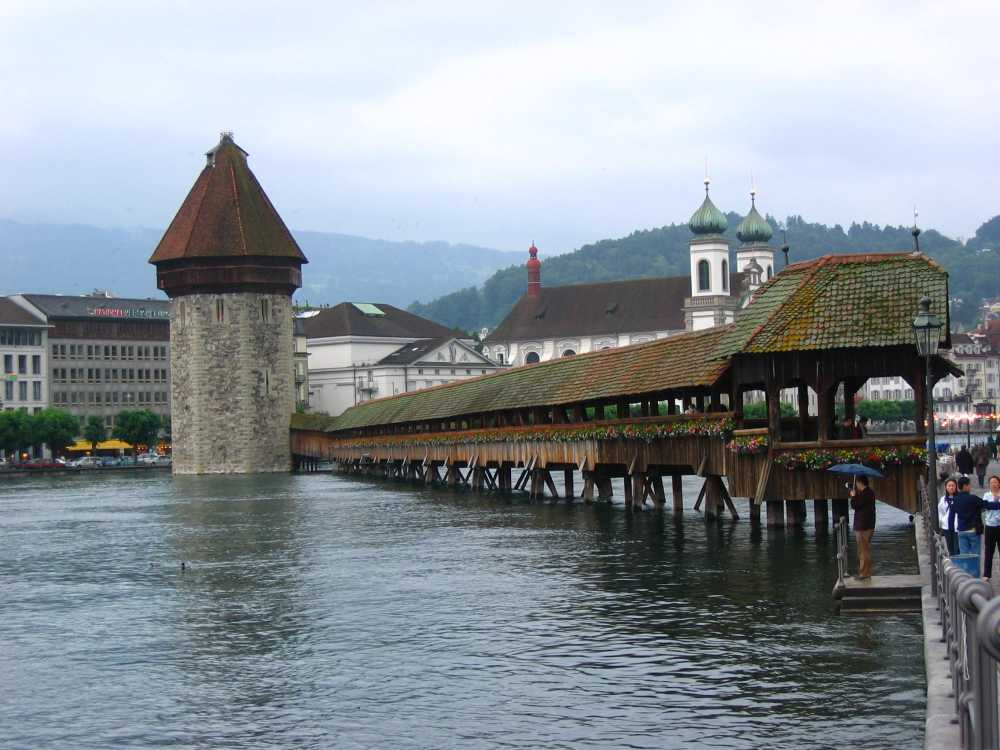 Kapellbrücke in Luzern